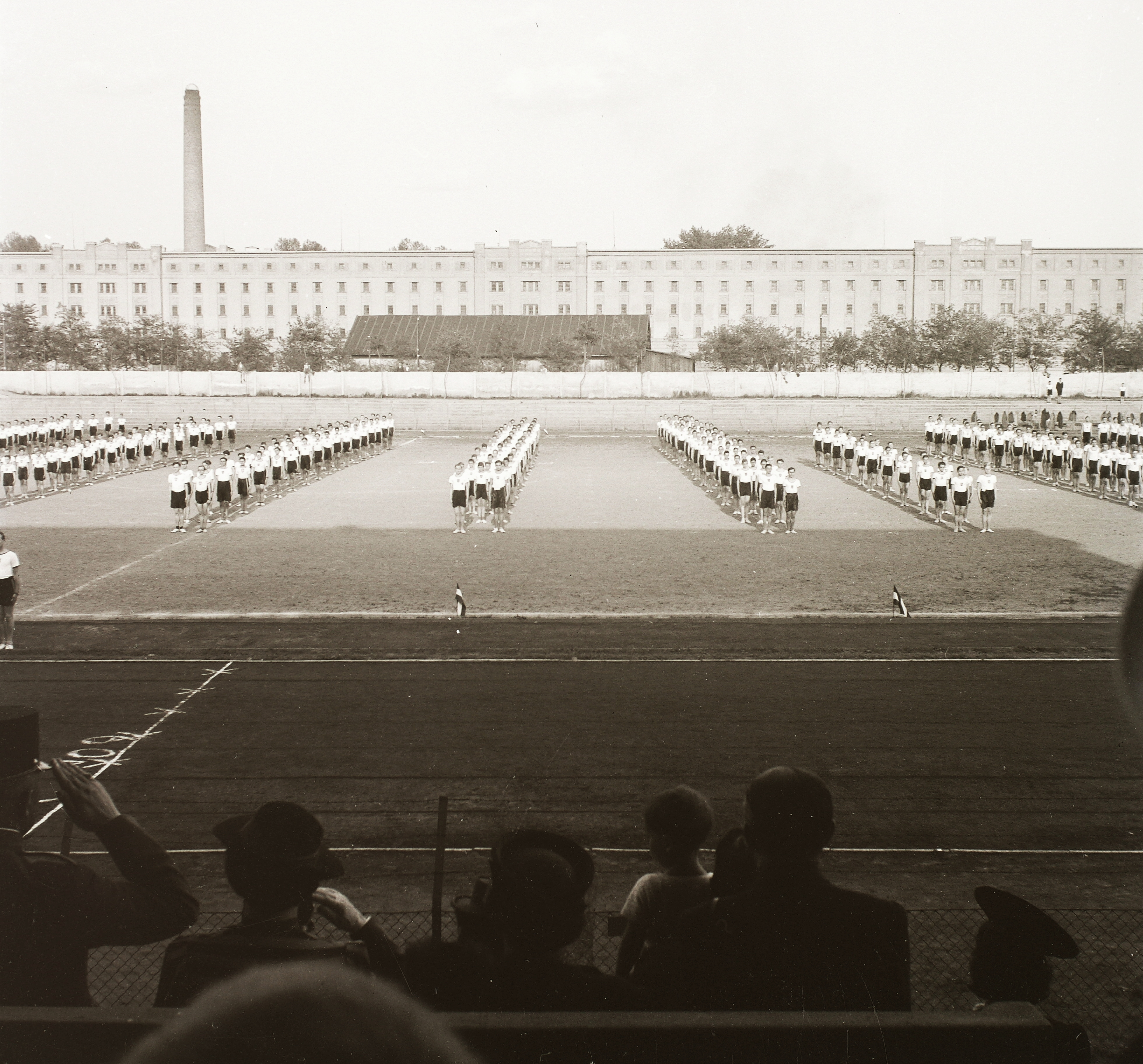 Kőrösy József (Mező) utca, BEAC sportpálya, háttérben a Lágymányosi dohánygyár épülete. Location: Hungary, Budapest XI. Tags: Budapest, tobacco factory Title: Kőrösy József (Mező) utca, BEAC sportpálya, háttérben a Lágymányosi dohánygyár épülete.